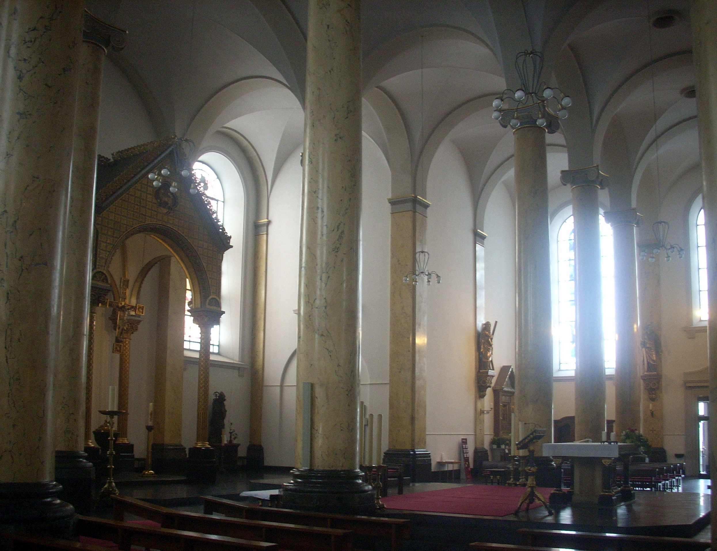 Krefeld, St. Dionysius, Altarraum